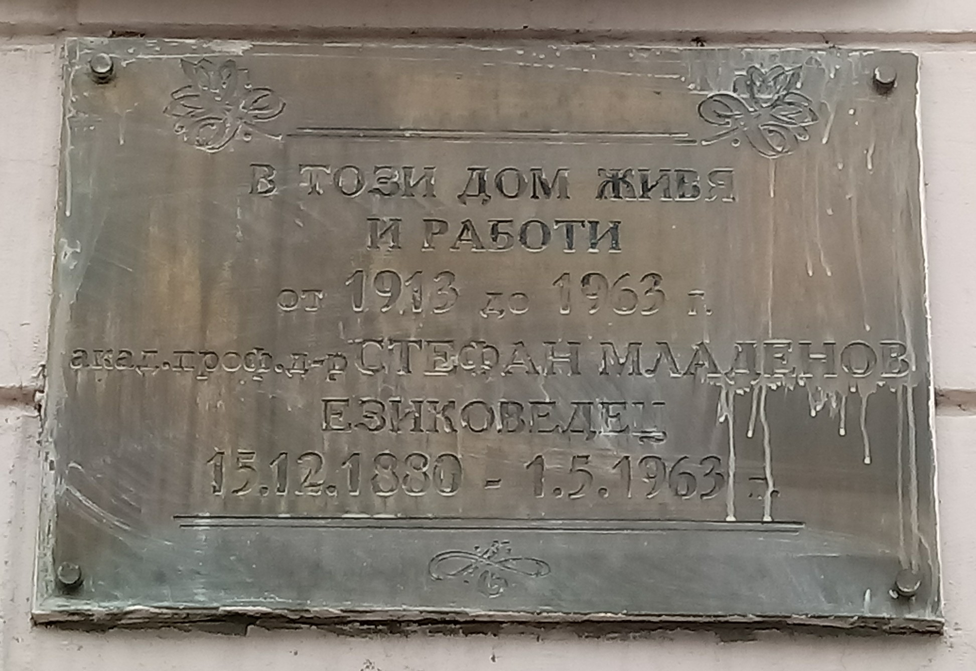 Stefan Mladenov memorial plaque, 26 Patriarch Evtimiy Blvd., Sofia